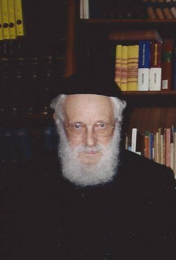 Rabinul Alexandru Safran, 1994, Geneva, fotografie realizata de Marilena Rotaru.